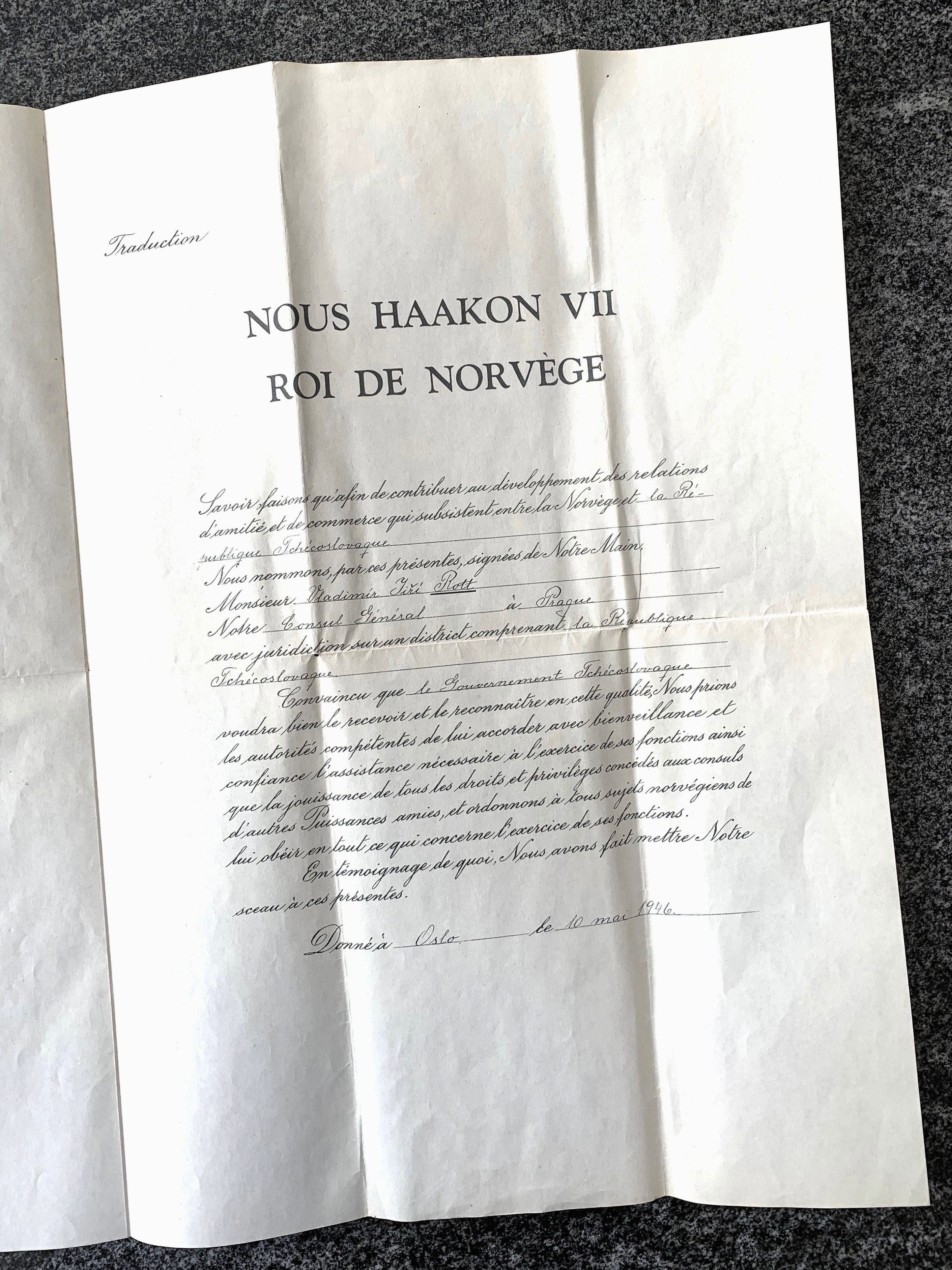 Vladimír Jiří Rott, Konsulský patent, Haakon VII, král Norska, 10.5.1946, fr. překlad